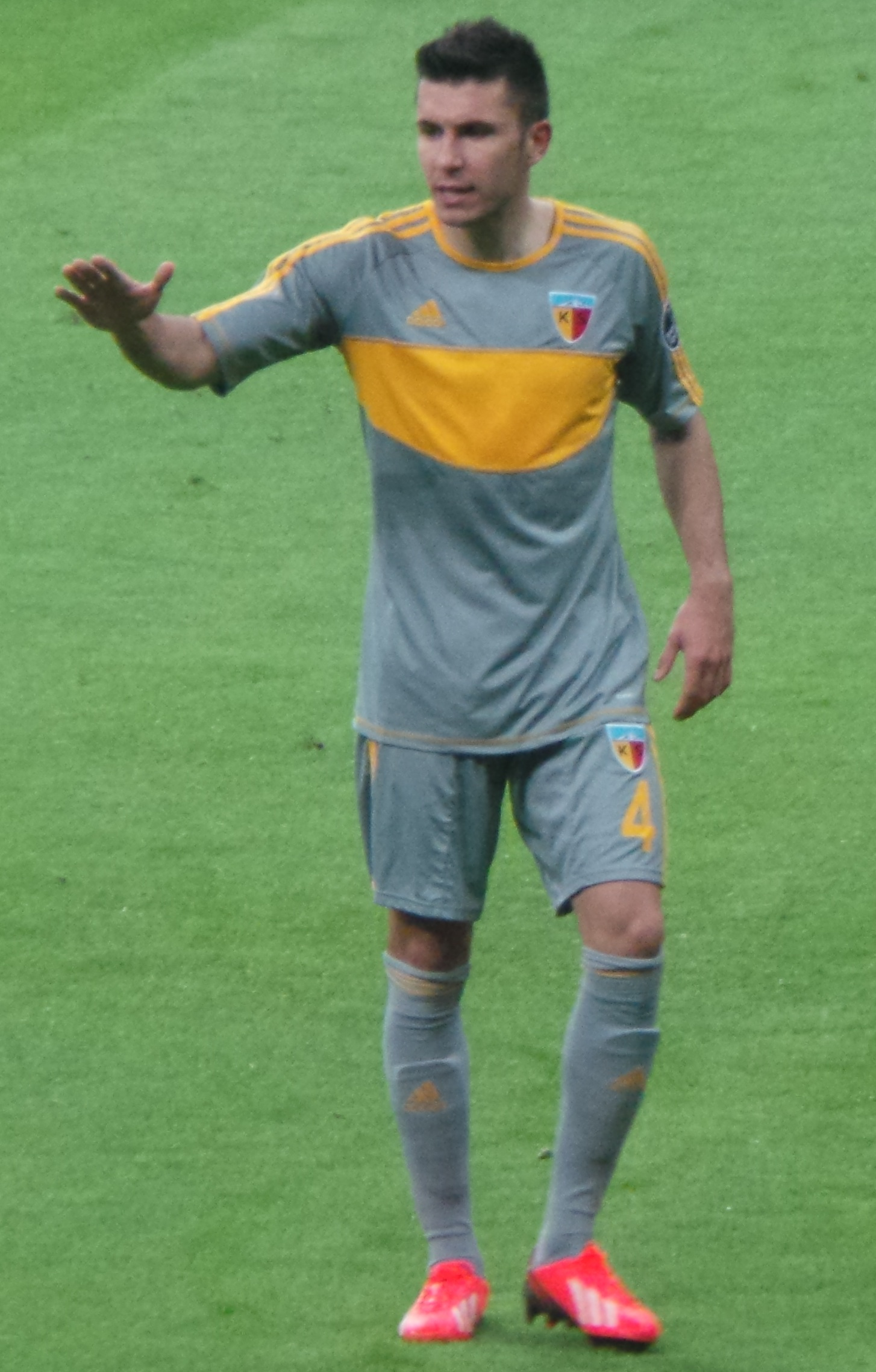 Cüneyt Köz